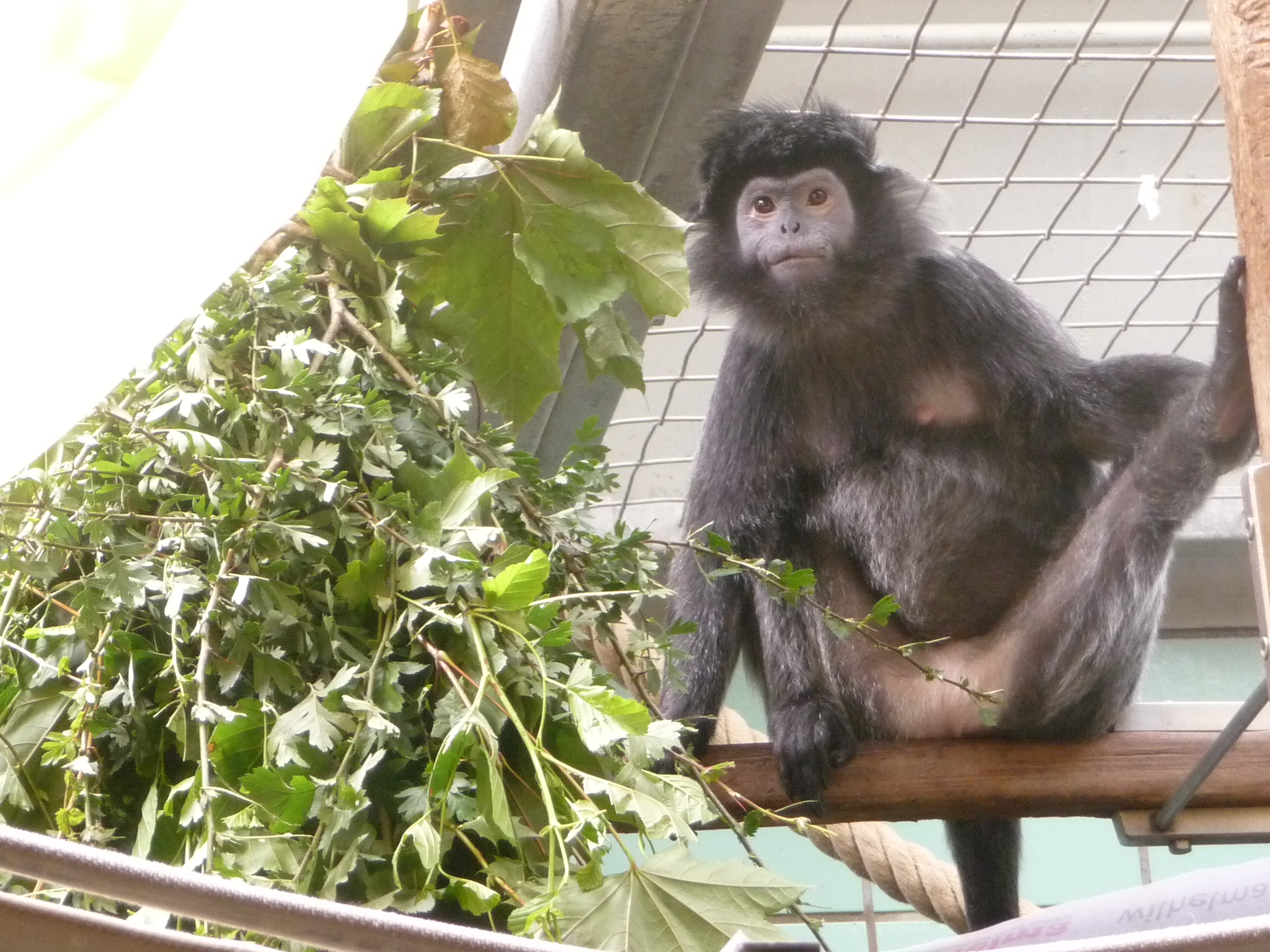 Haubenlangur in der Wilhelma